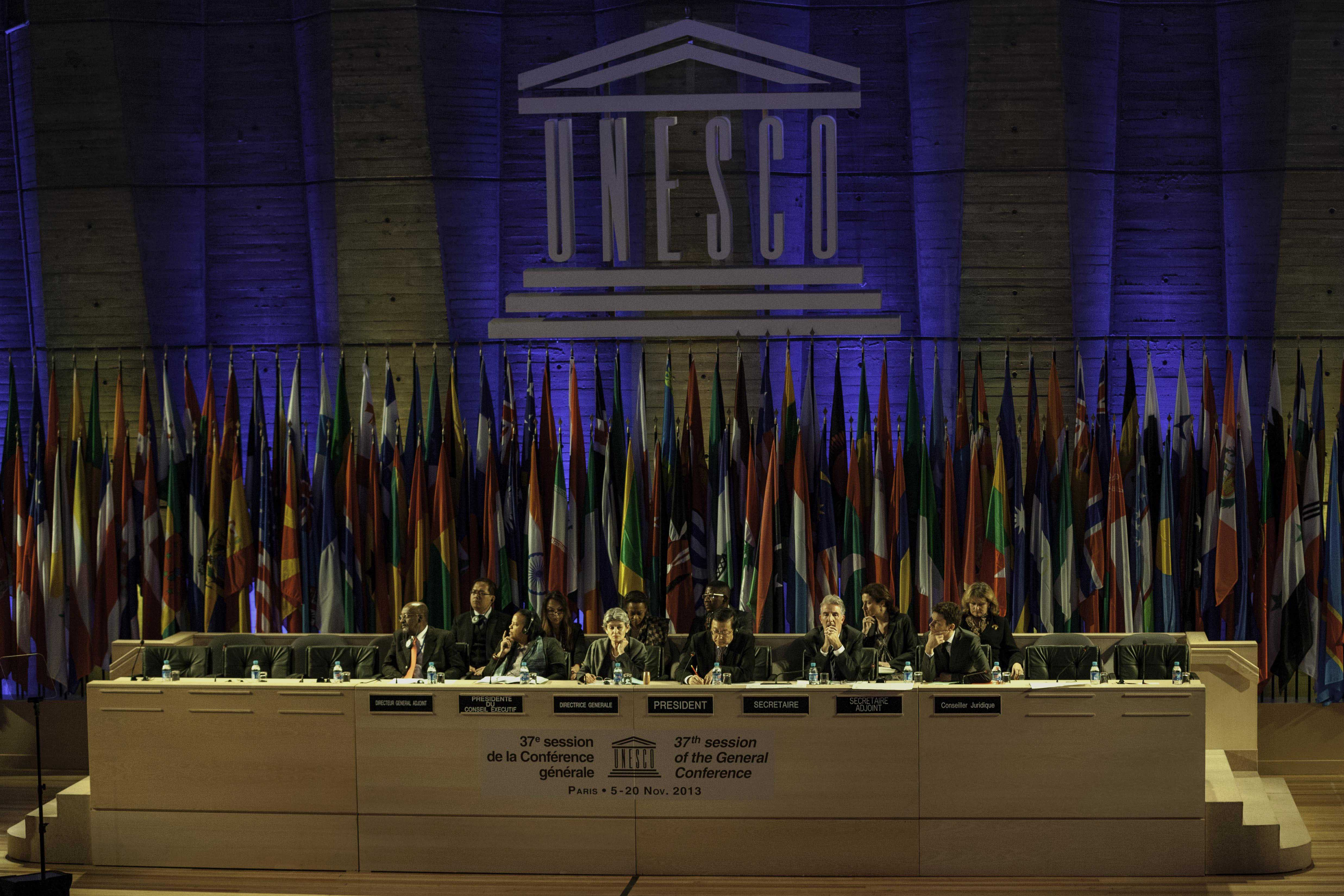 Paris (Francia), 07 de noviembre 2013. El Presidente del Ecuador, Rafael Correa, ofreció un discurso en el pleno de la "37 Asamblea General de la UNESCO". Foto: Fernanda LeMarie - Cancillería del Ecuador.